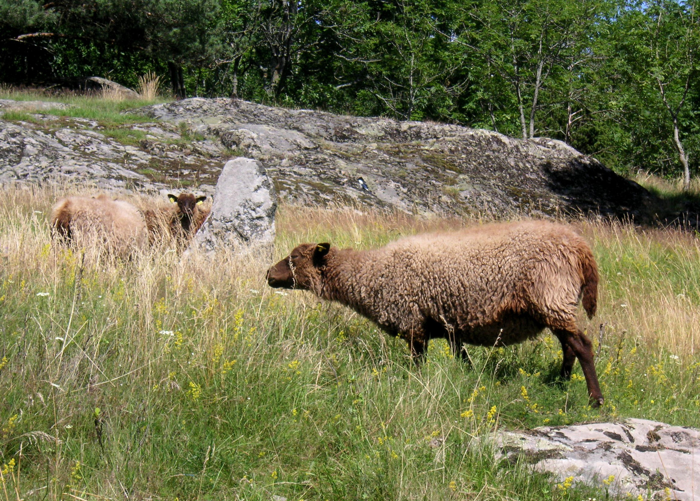 Naturen vid sjön Aspen i Botkyrka, betande får på Skrävstas gamla bytomt